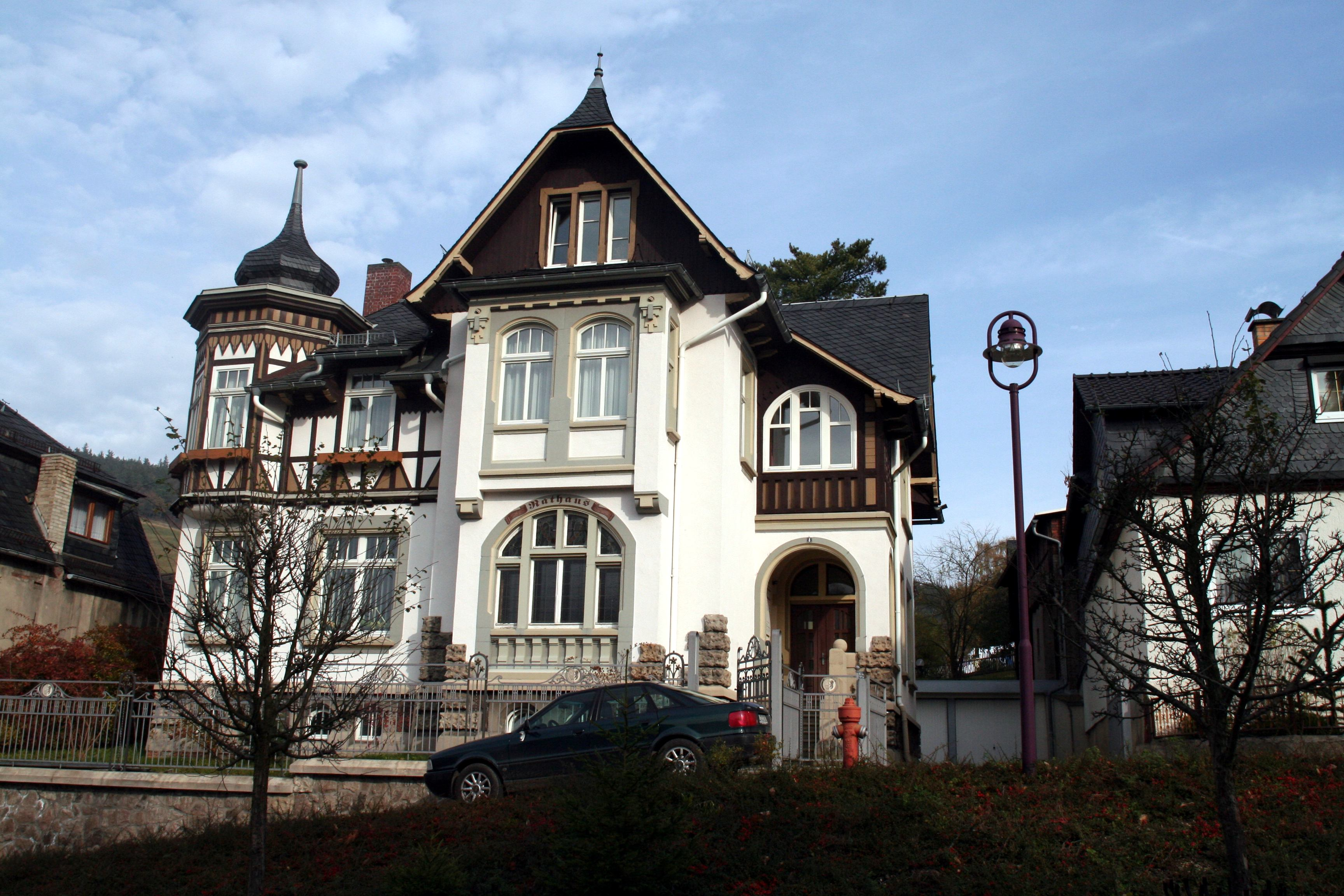 Rathaus Probstzella in Südthüringen